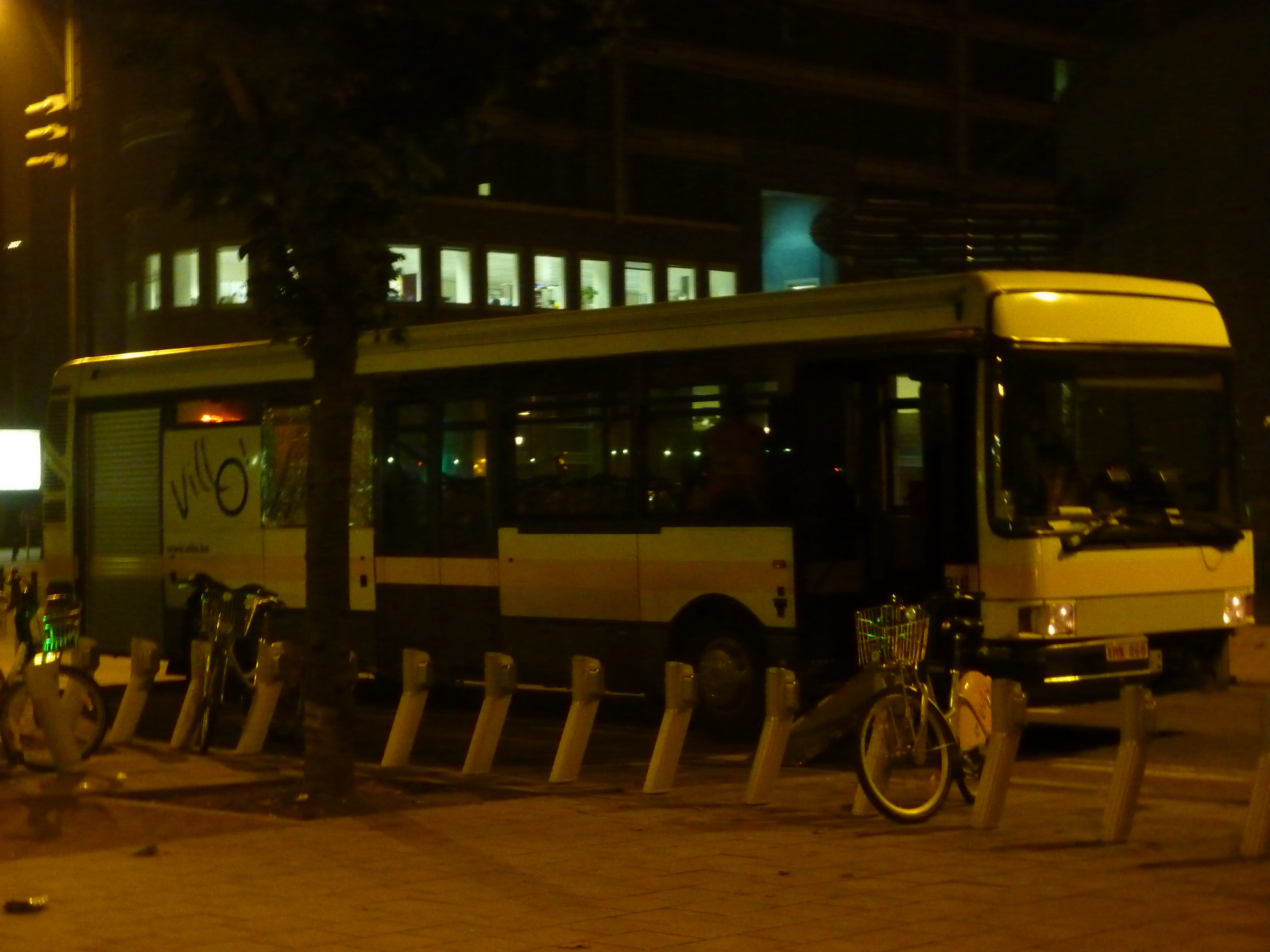 Bus Villo!.